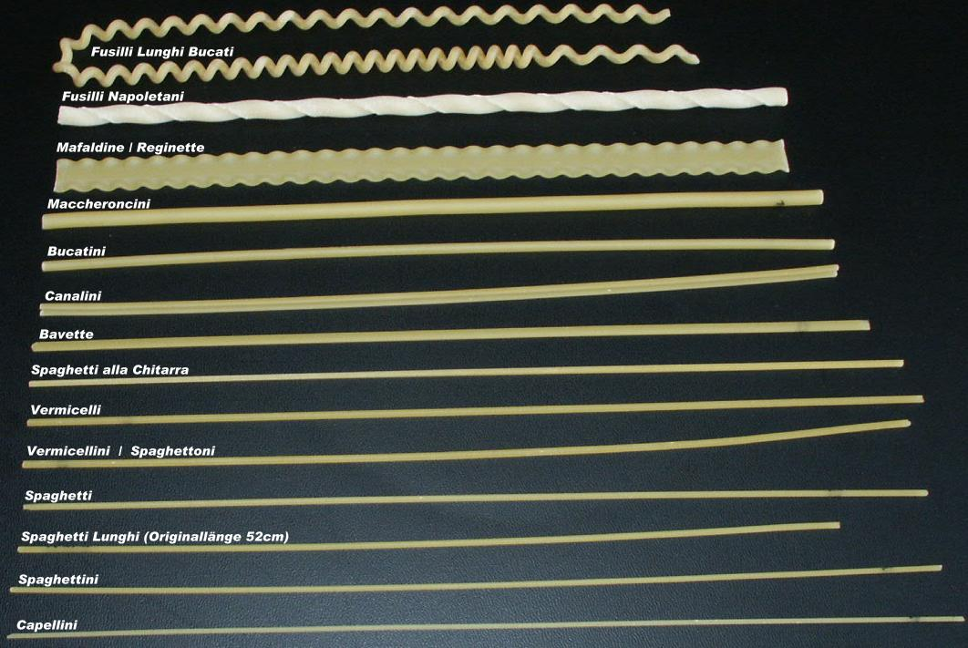 Quelle: selbst fotografiert, 10/2004